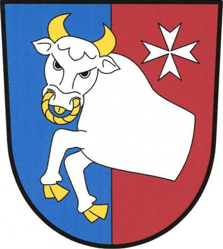 Blažim (PS), znak. V modro-červeně polceném štítě polovina stříbrného zubra ve skoku se zlatou zbrojí, jazykem a houžví, provázená vlevo nahoře stříbrným maltézským křížem.